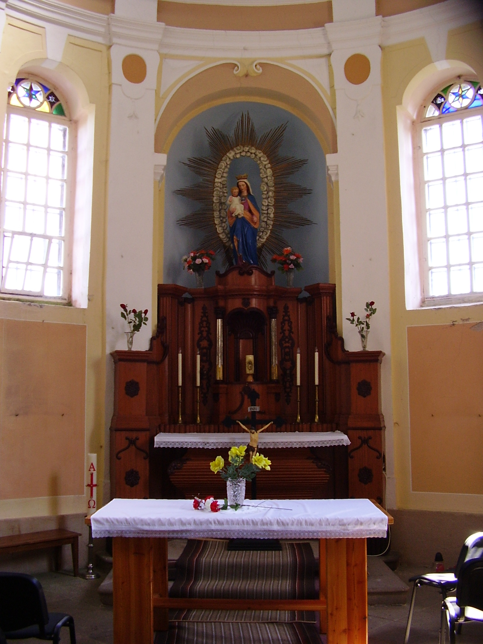 Hvězda (kaple) - interiér